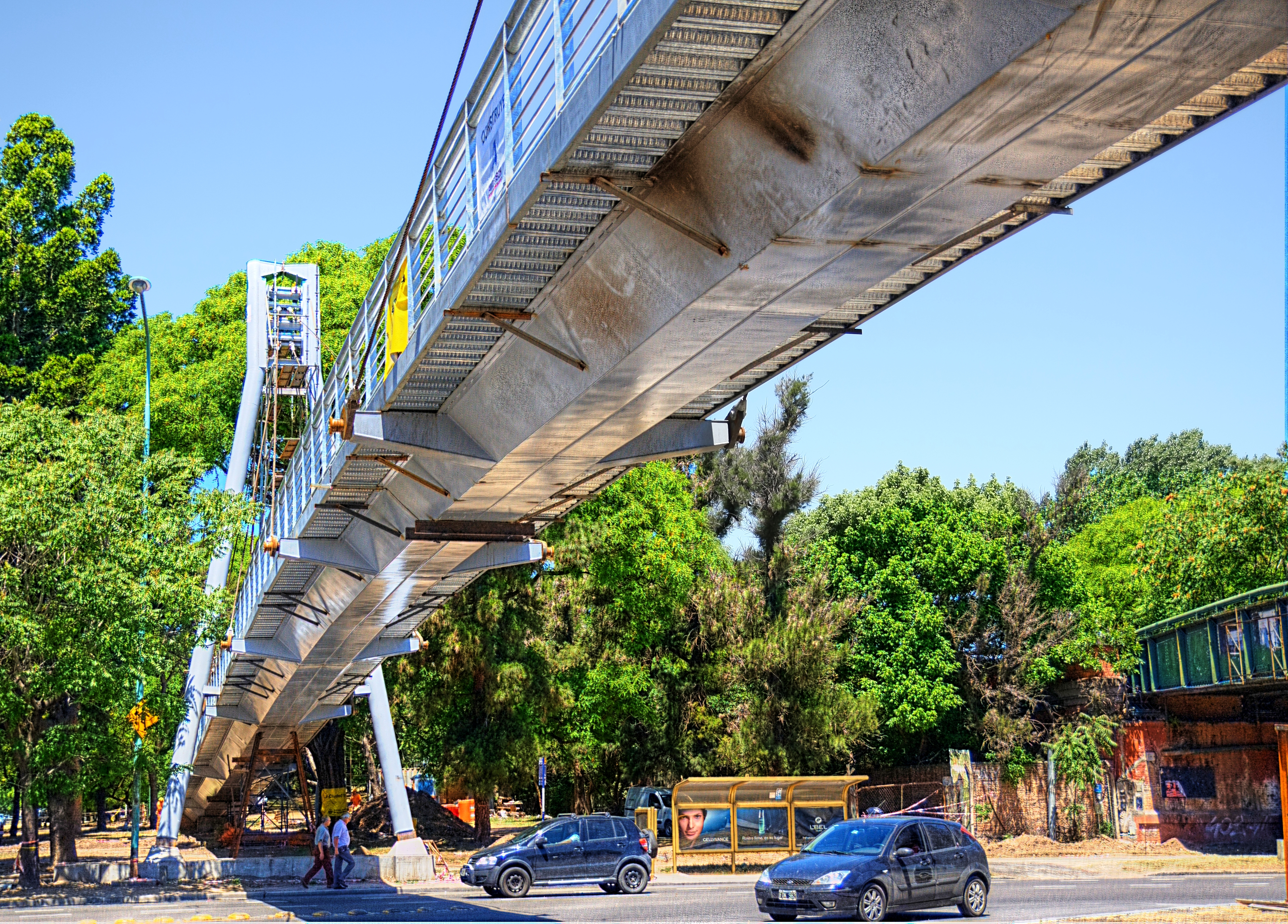 Puente peatonal sobre la Avenida Dorrego en el barrio de Palermo de la Ciudad de Buenos Aires, Argentina.